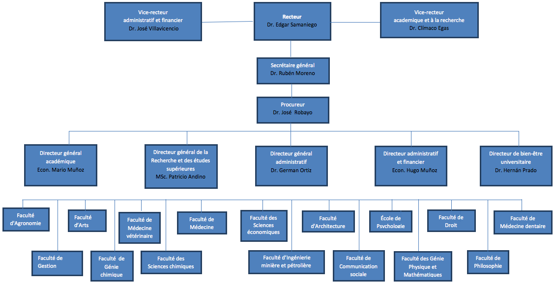 Organigramme (en français) des autorités de l'Université centrale d'Équateur